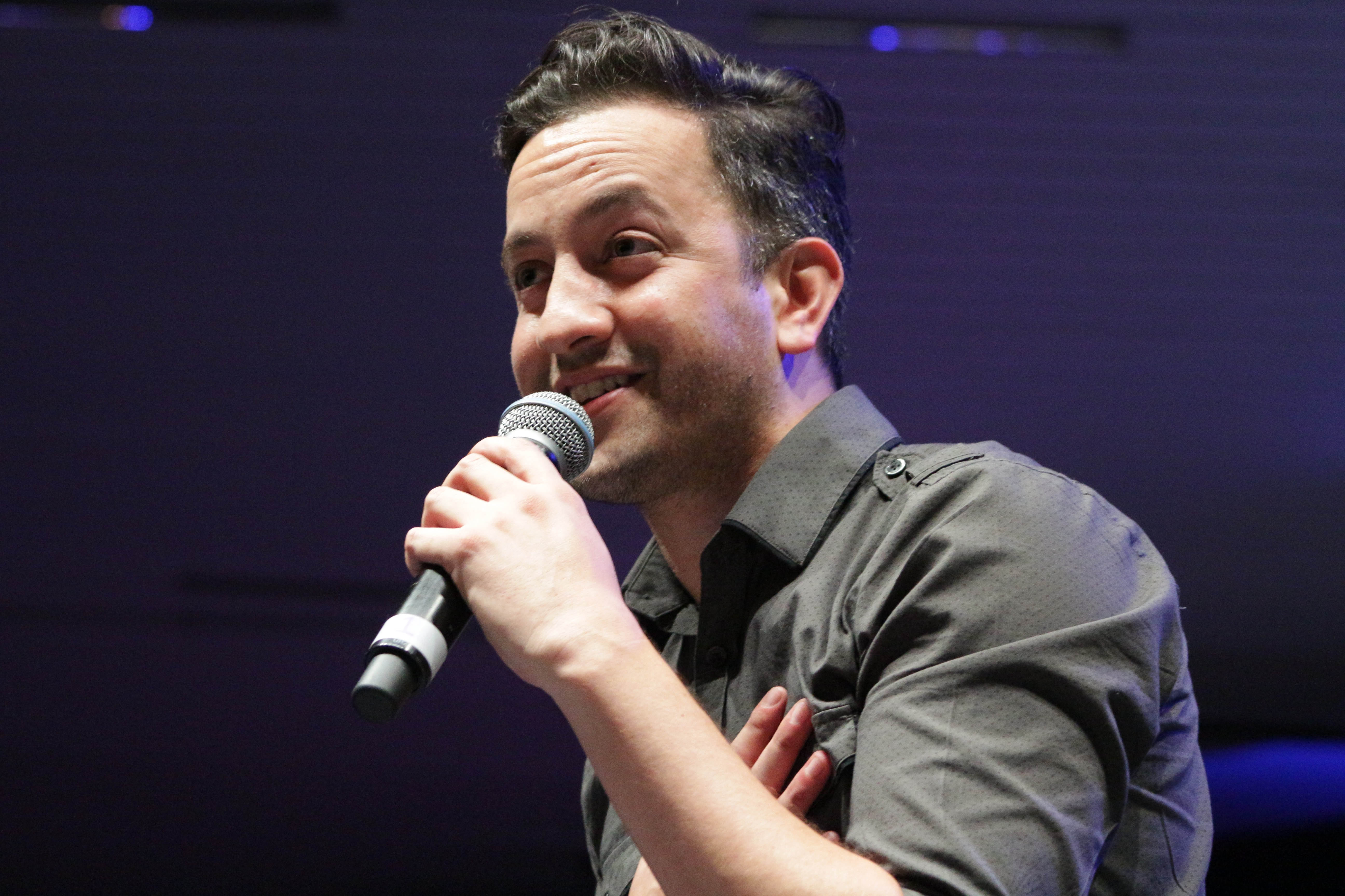 Chumel Torres